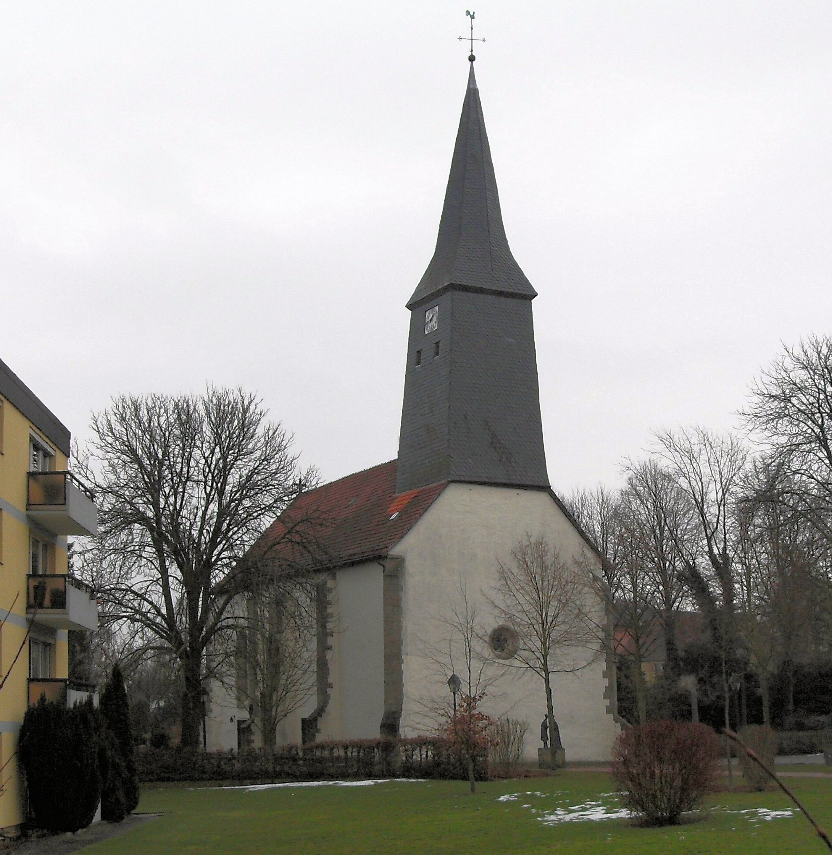 Westseite der evangelischen Kirche in Lotte, Westfalen